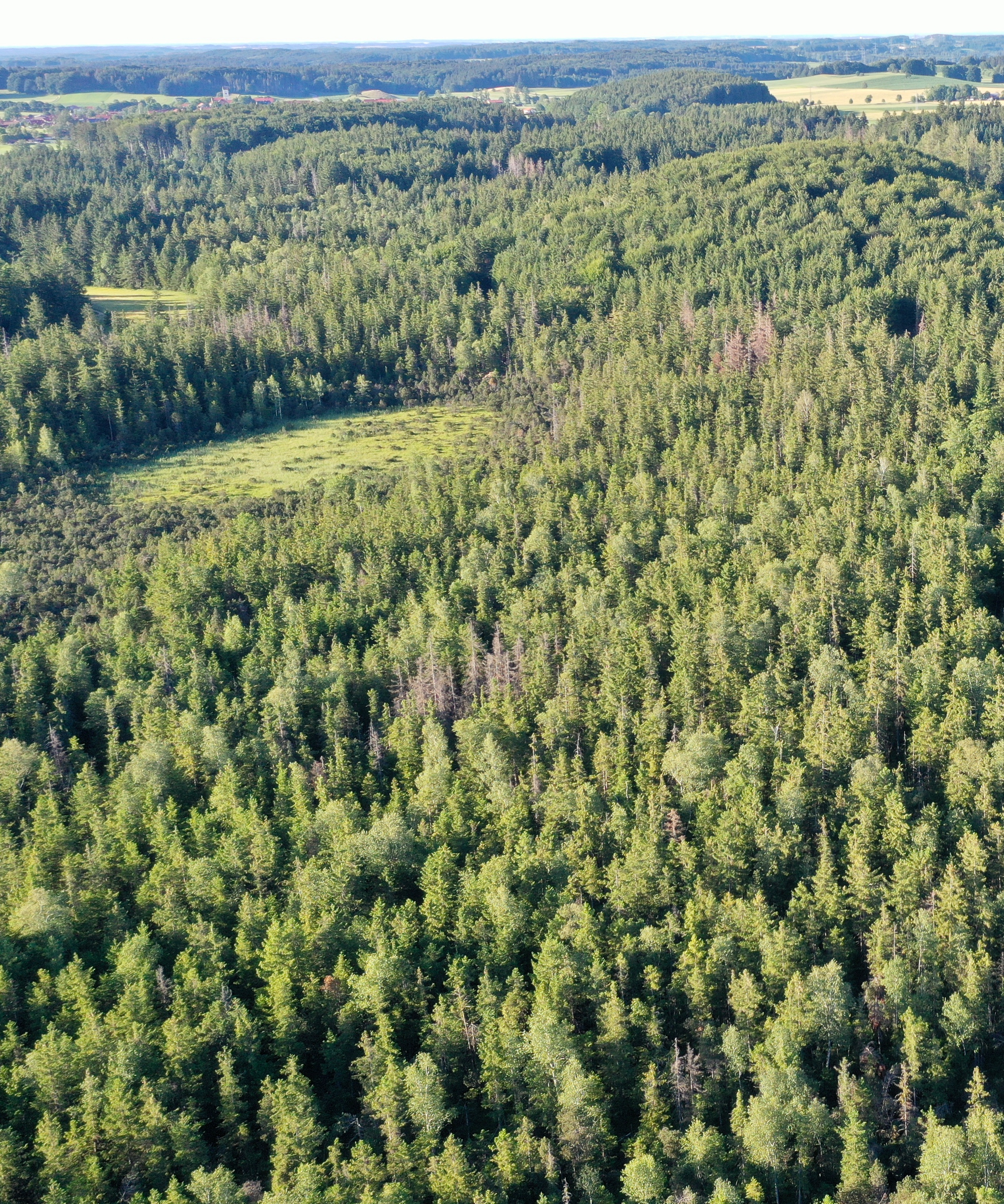 Das Naturschutzgebiet Schollenmoos. Die Lichtung am linken Bildrand ist das Zentrum des Schutzgebietes, der sogenannte Moorkern.